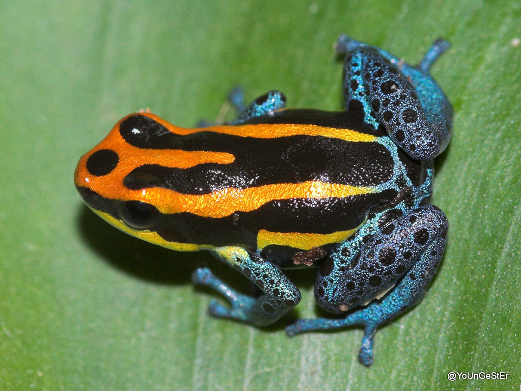 Ranitomeya amazonica, syn. Dendrobates amazonicus